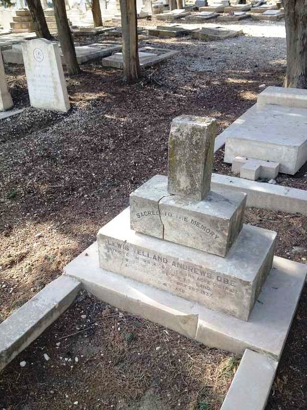 Lewis Yelland Andrews (1896-1937) war der britische Distriktbeauftragte für Galiläa während des Britischen Mandats für Palästina. Auf dem Weg zur Christuskirche in Nazareth fiel er am 26. September 1937 einem arabischen Terrorakt zum Opfer.